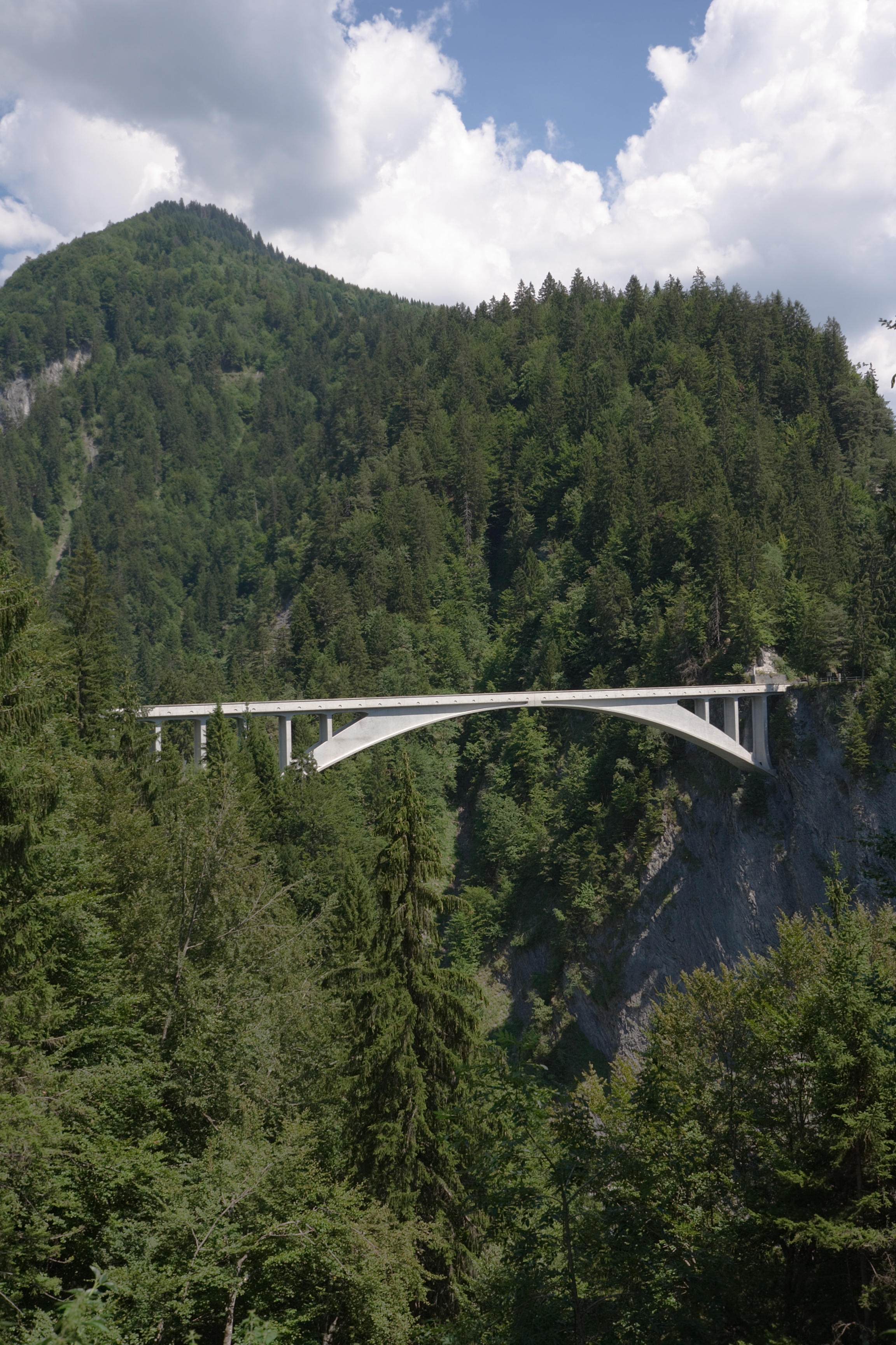 Die Salginatobelbrücke bei Schiers, SchweizAnsicht von Südwesten